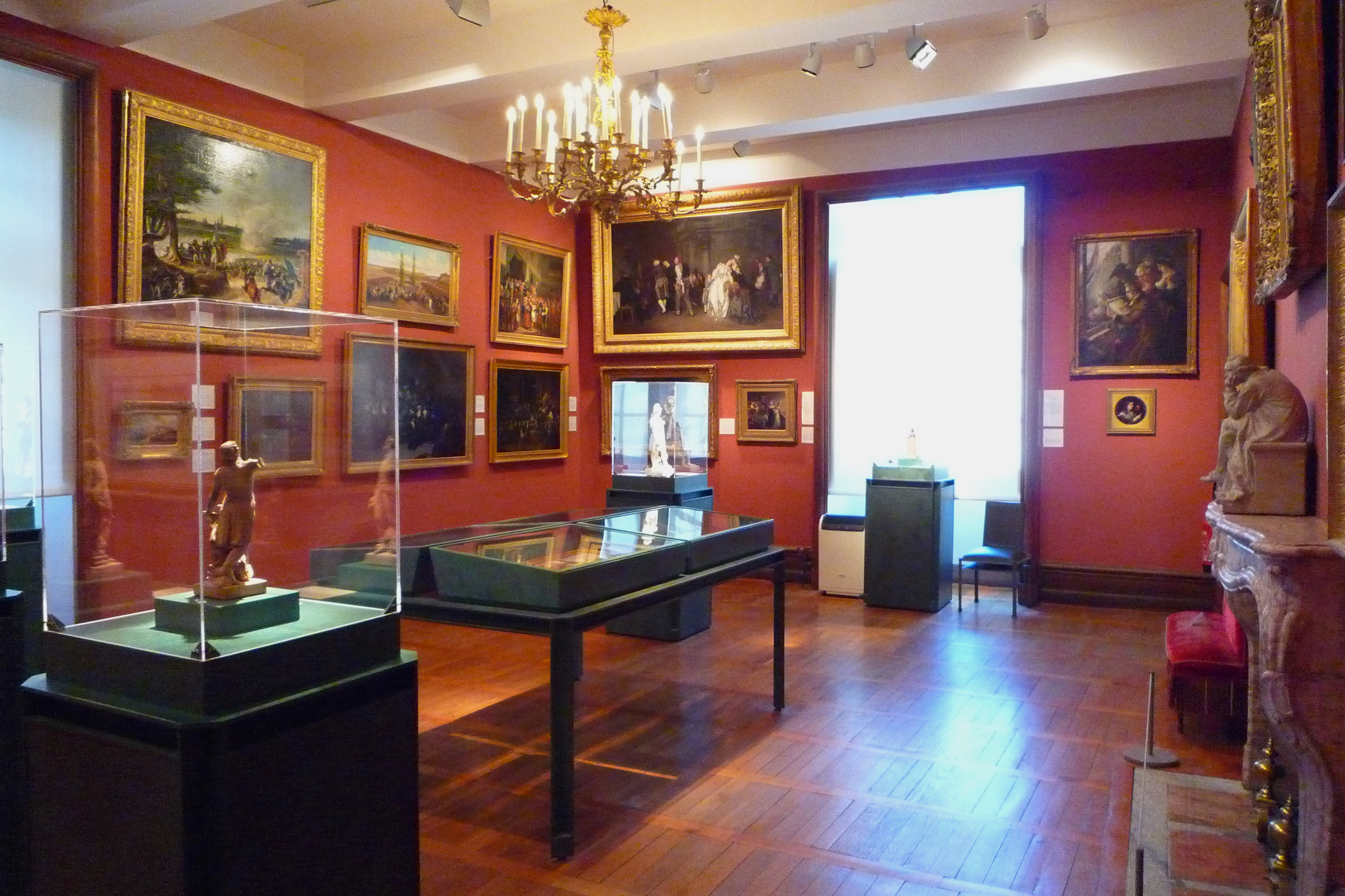 Salle du XIXe siècle, niveau 3, Musée de la Révolution française - Vizille (France)